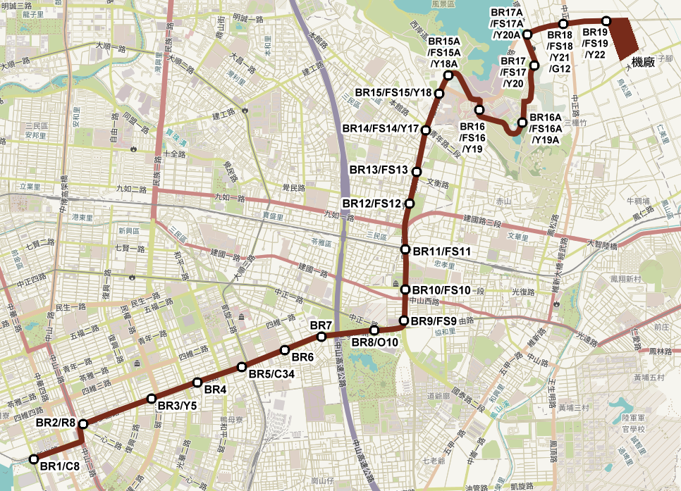 2014年頃的高雄捷運輕軌棕線